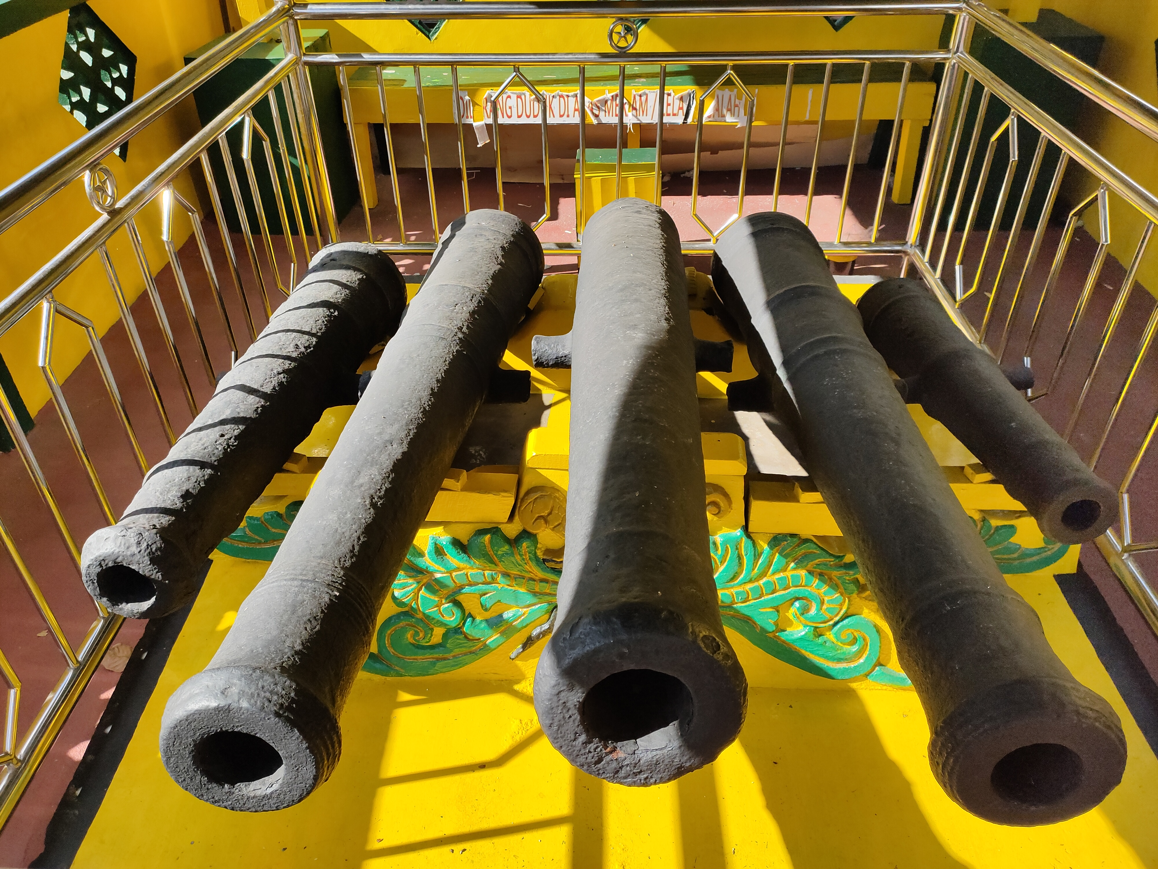 Meriam Lela di Kabupaten Sanggau